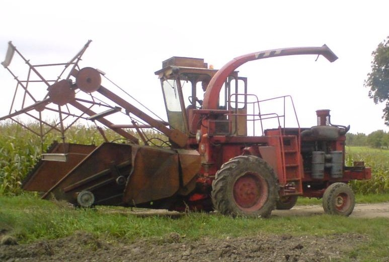 Maszyna podstawowa Z340 w czasie koszenia kukurydzy